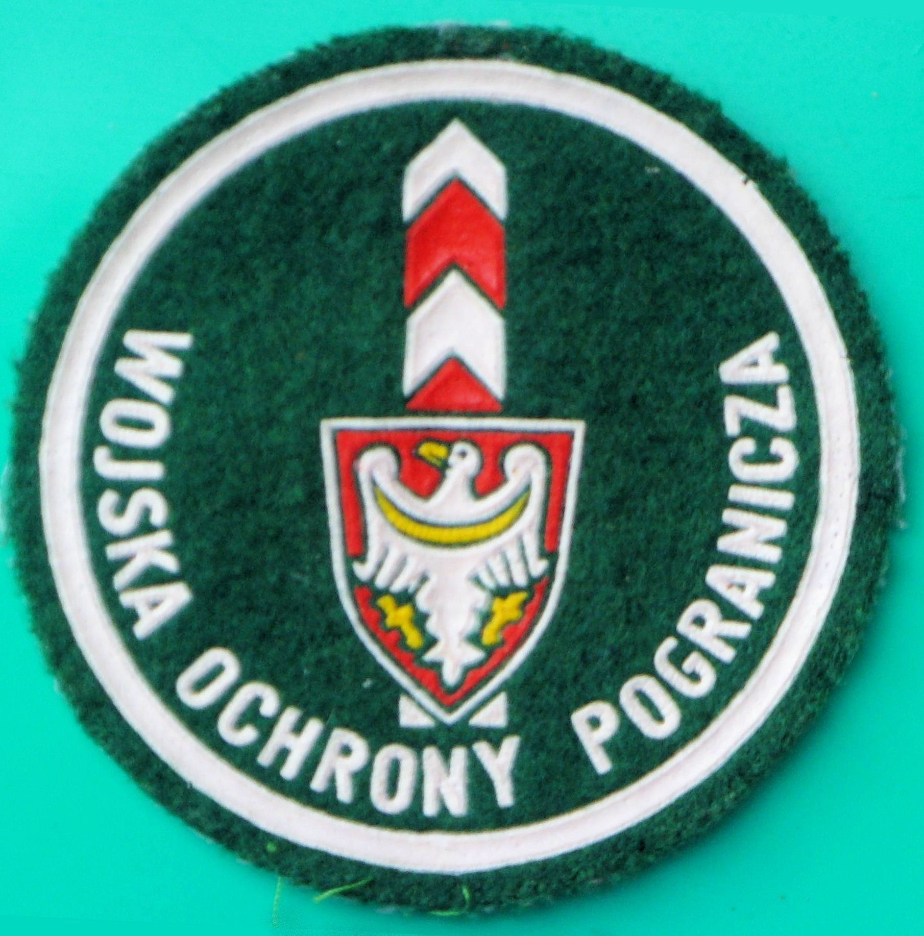 Naszywka Brygady WOP